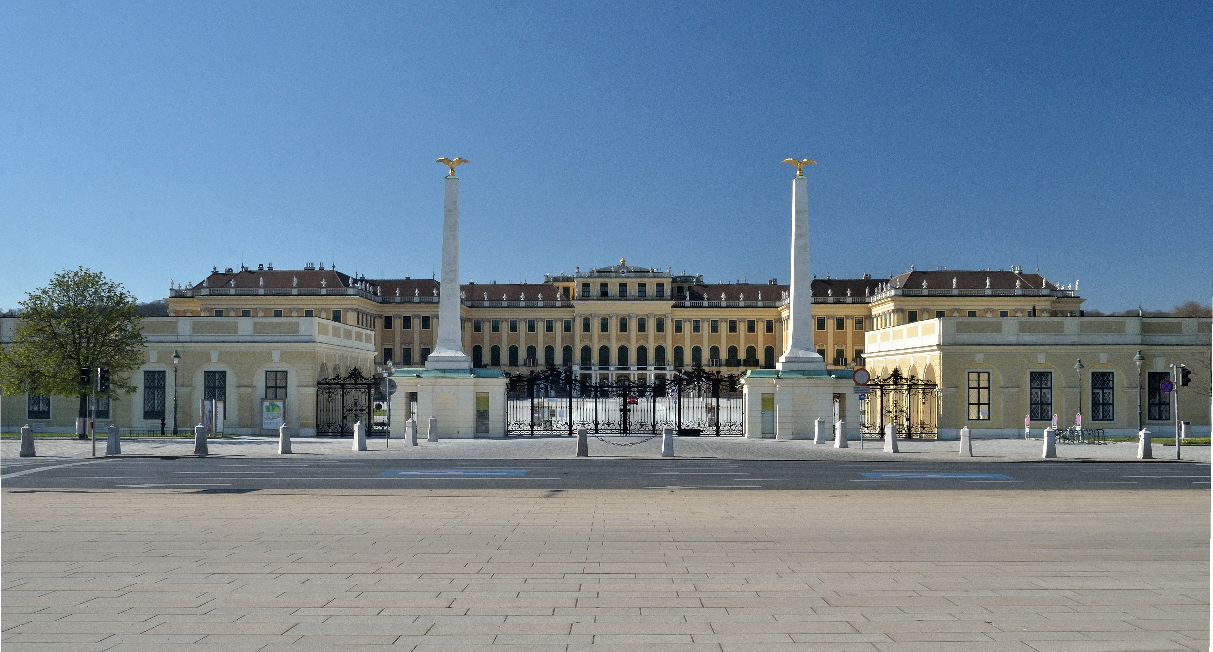 Haupteingang und Schloss Schönbrunn von der Schönbrunner Schlossbrücke an einem Donnerstag vormittag, keine Touristen und kaum Autos wegen COVID-19.